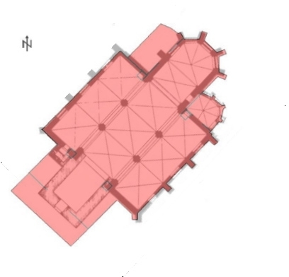 St.Gereon in Würm, Grundrissvergleich vor 1945 - nach Wiederaufbau 1953 (rosa). Die Säulen im Langschiff sind mit Wiederaufbau entnommen